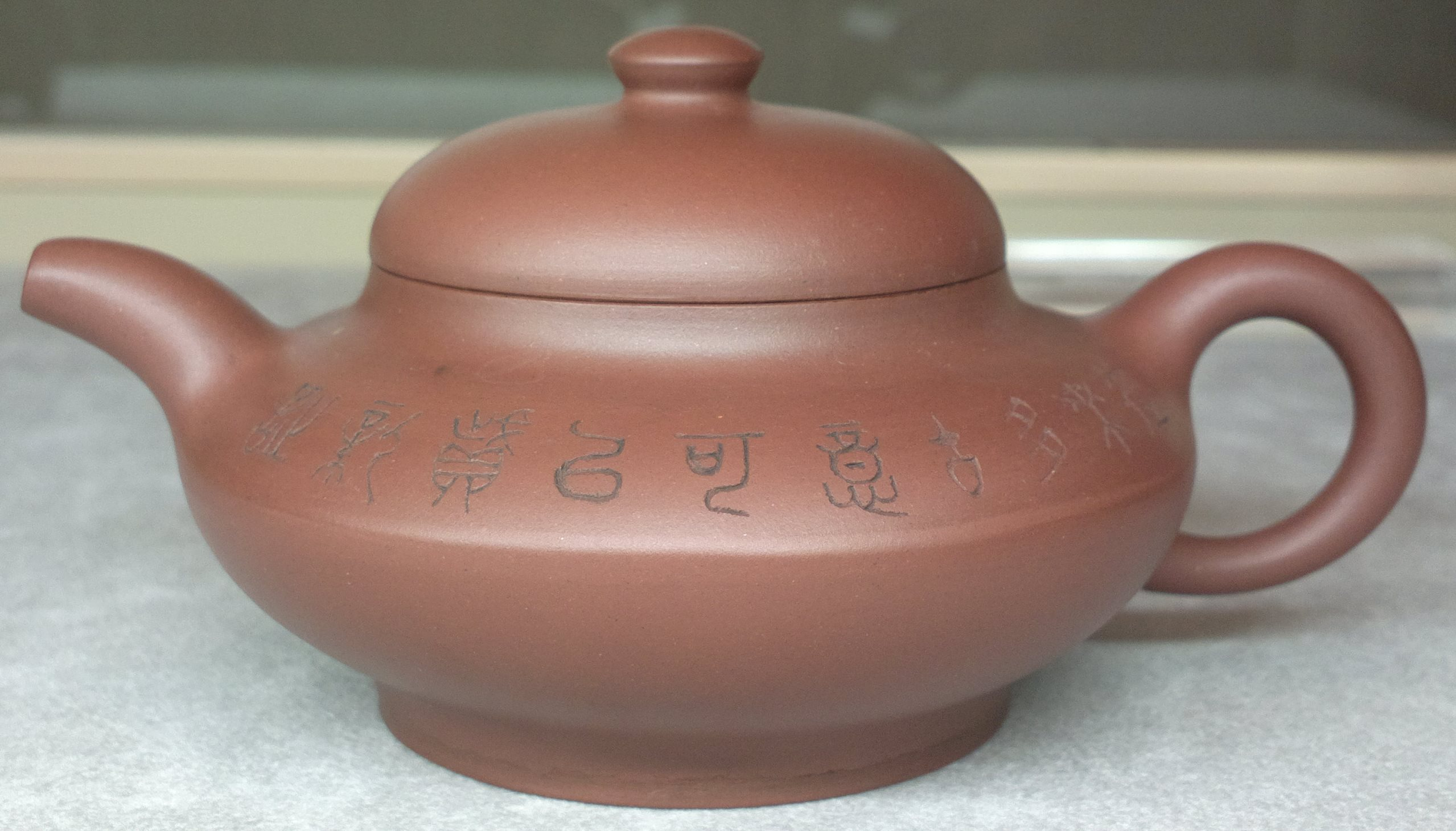 Théière Hehuan en argile de Yixing ou glaise zisha par Xu Xu. Exposition au Centre culturel de Chine à Paris du 4 au 13 septembre 2013.